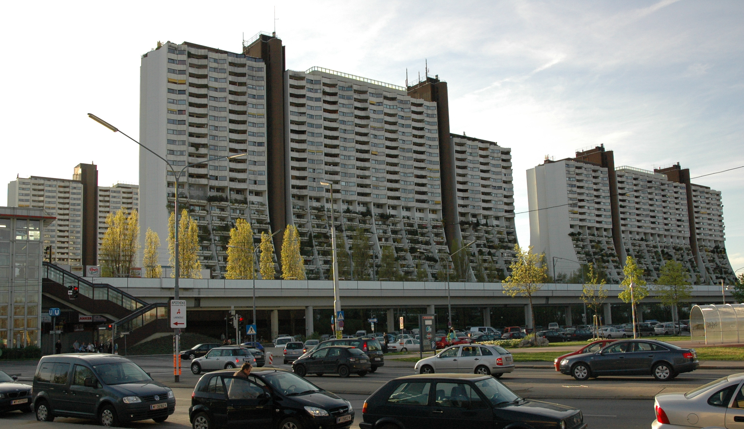 Wohnpark Alterlaa, Ostansicht, Wien-Liesing